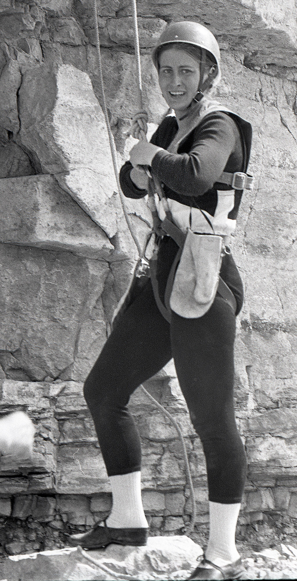 Anu Kallavus.